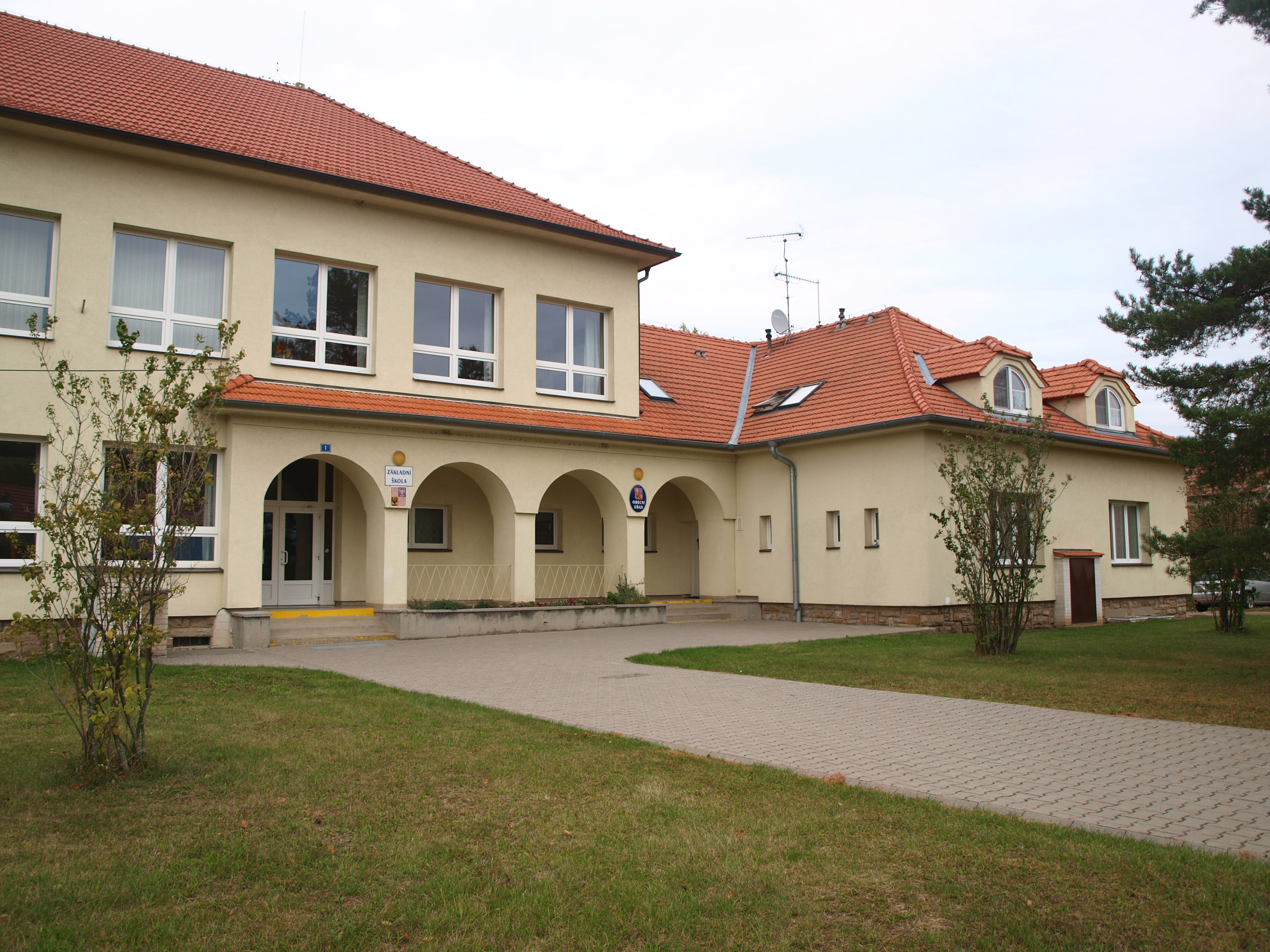 Kuželov, obecní úřad a základní škola